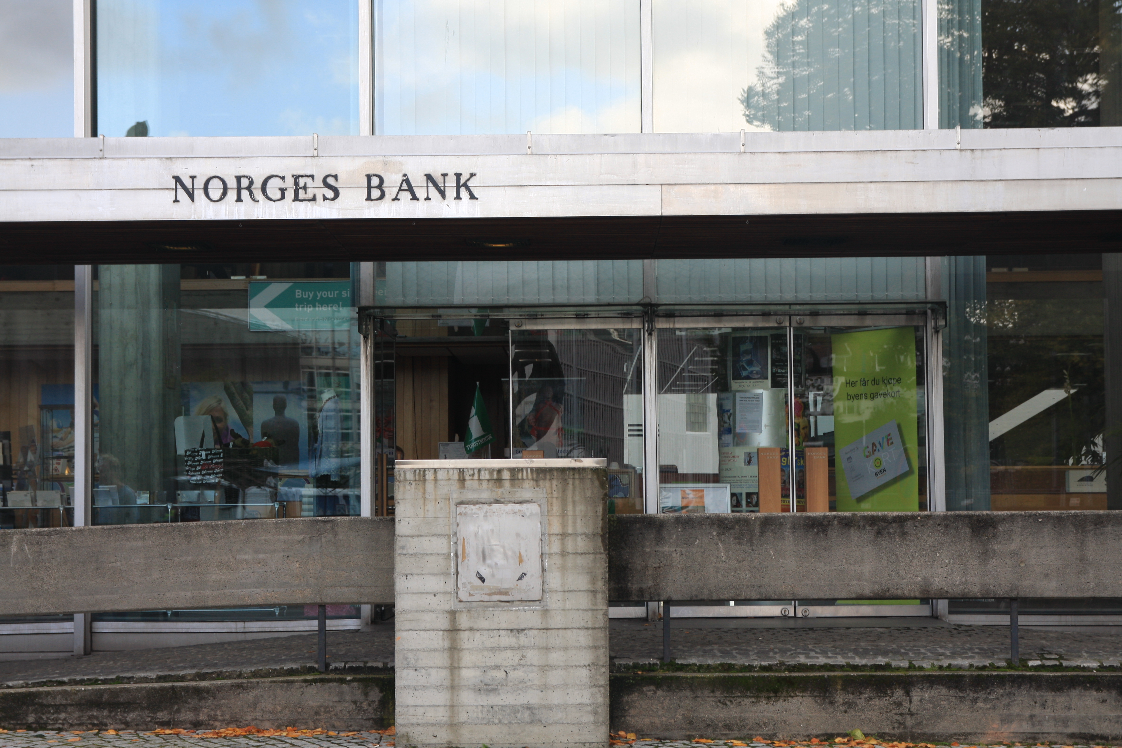 Norges Bank_inngangsparti